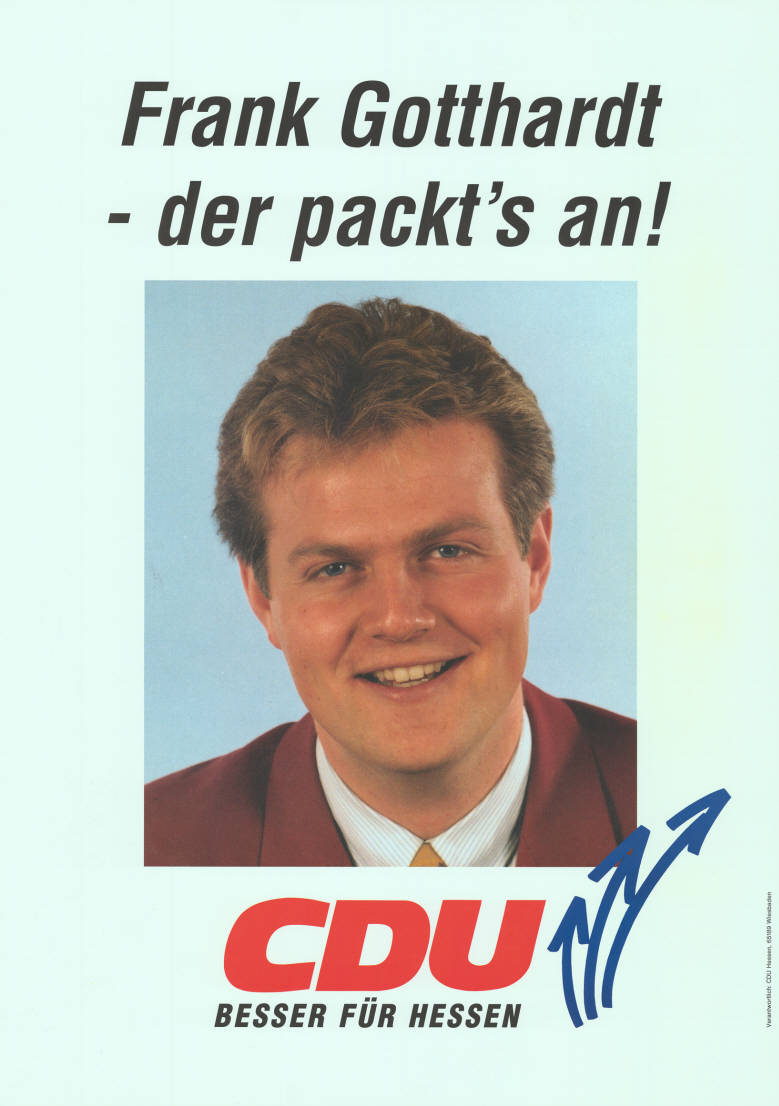 Frank Gotthardt - der packt's an! CDU Besser für Hessen Abbildung: Porträtfoto - Drei aufstrebende Pfeile Plakatart: Kandidaten-/Personenplakat mit Porträt Auftraggeber: Verantw.: CDU Hessen, Wiesbaden Objekt-Signatur: 10-007 : 1004 Bestand: Landtagswahlplakate Hessen (10-007) GliederungBestand10-18: Landtagswahlplakate Hessen (10-007) » CDU Lizenz: KAS/ACDP 10-007 : 1004 CC-BY-SA 3.0 DE